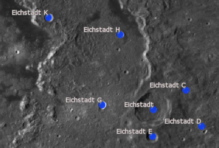 Cráter lunar Eichstadt. Cráteres satélite (Imagen LRO)